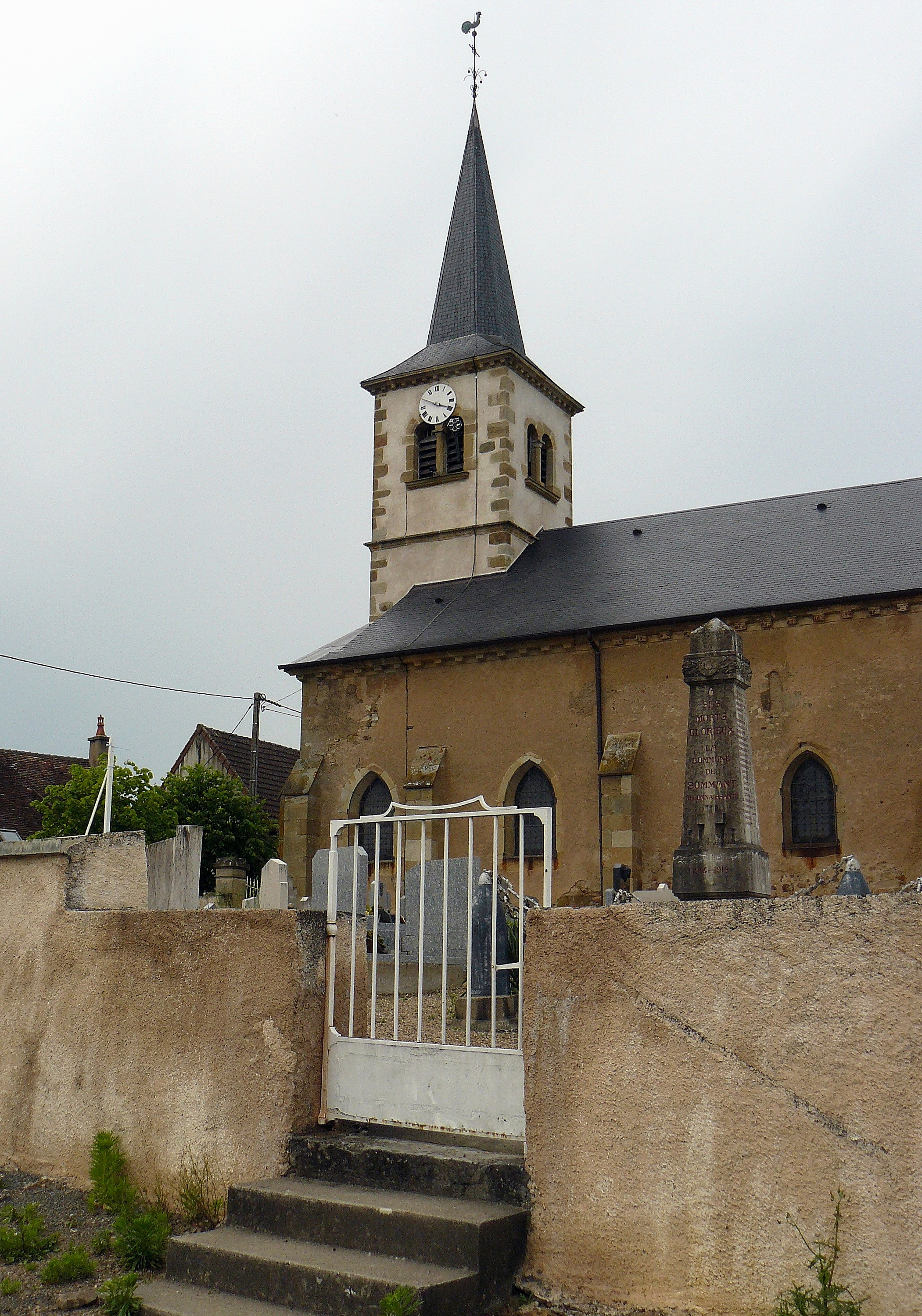 L'église de Sommant (Saône-et-Loire, France)